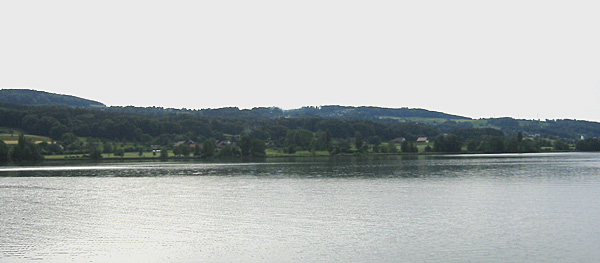 Der südliche Teil der Gemeinde Maur vom Greifensee aus gesehen. Links unten am Ufer sind die Häuser von Uessikon zu erkennen. Darüber liegt zwischen den beiden bewaldeten Hügelkuppen die Forch. Am rechten Bildrand ist der Turm der Kirche von Maur zu sehen.